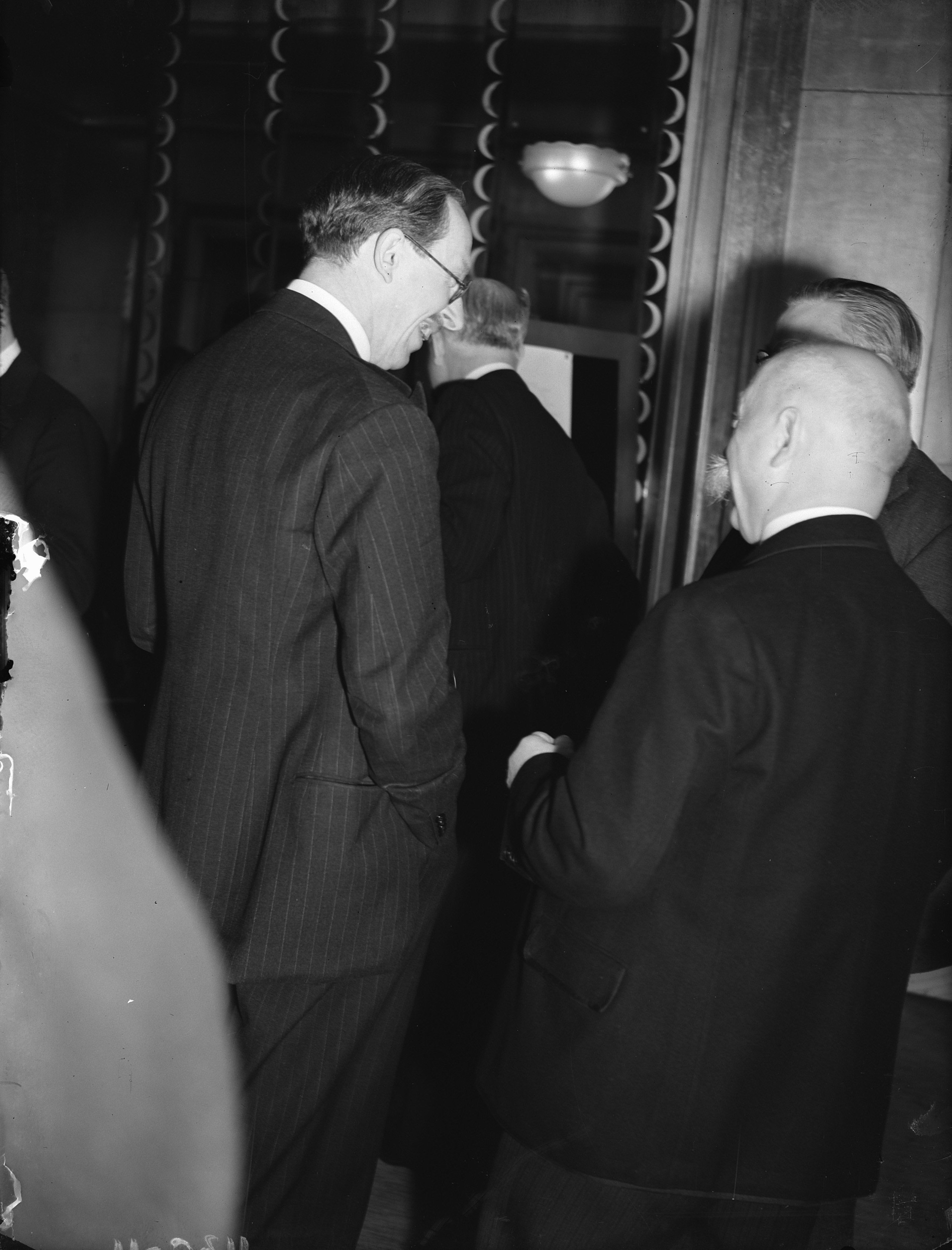 Collectie / Archief : Fotocollectie Anefo Reportage / Serie : HIE [Holland in England] / Anefo Londen serie Beschrijving : Oranjehaven, de Engelandvaarders club in Londen. De Britse staatssecretaris van de Dominions Viscount Cranborne en minister-president Gerbrandy hebben een vrolijk onderhoud Datum : september 1944 Locatie : Groot-Brittannië, Londen Trefwoorden : clubs, ministers, premiers, staatssecretarissen, tweede wereldoorlog Persoonsnaam : Gascoyne-Cecil, Robert Arthur James (5th Marquess of Salisbury), Gerbrandy, Pieter Sjoerd Instellingsnaam : Oranjehaven Fotograaf : Onbekend / Publiek Domein, [onbekend] Auteursrechthebbende : Nationaal Archief Materiaalsoort : Glasnegatief Nummer archiefinventaris : bekijk toegang 2.24.01.09 Bestanddeelnummer : 935-2603